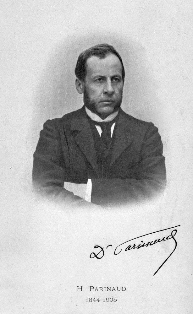 Henri Parinaud, in :Annales d' oculistique, Doin (Paris), 1905, p. 320.